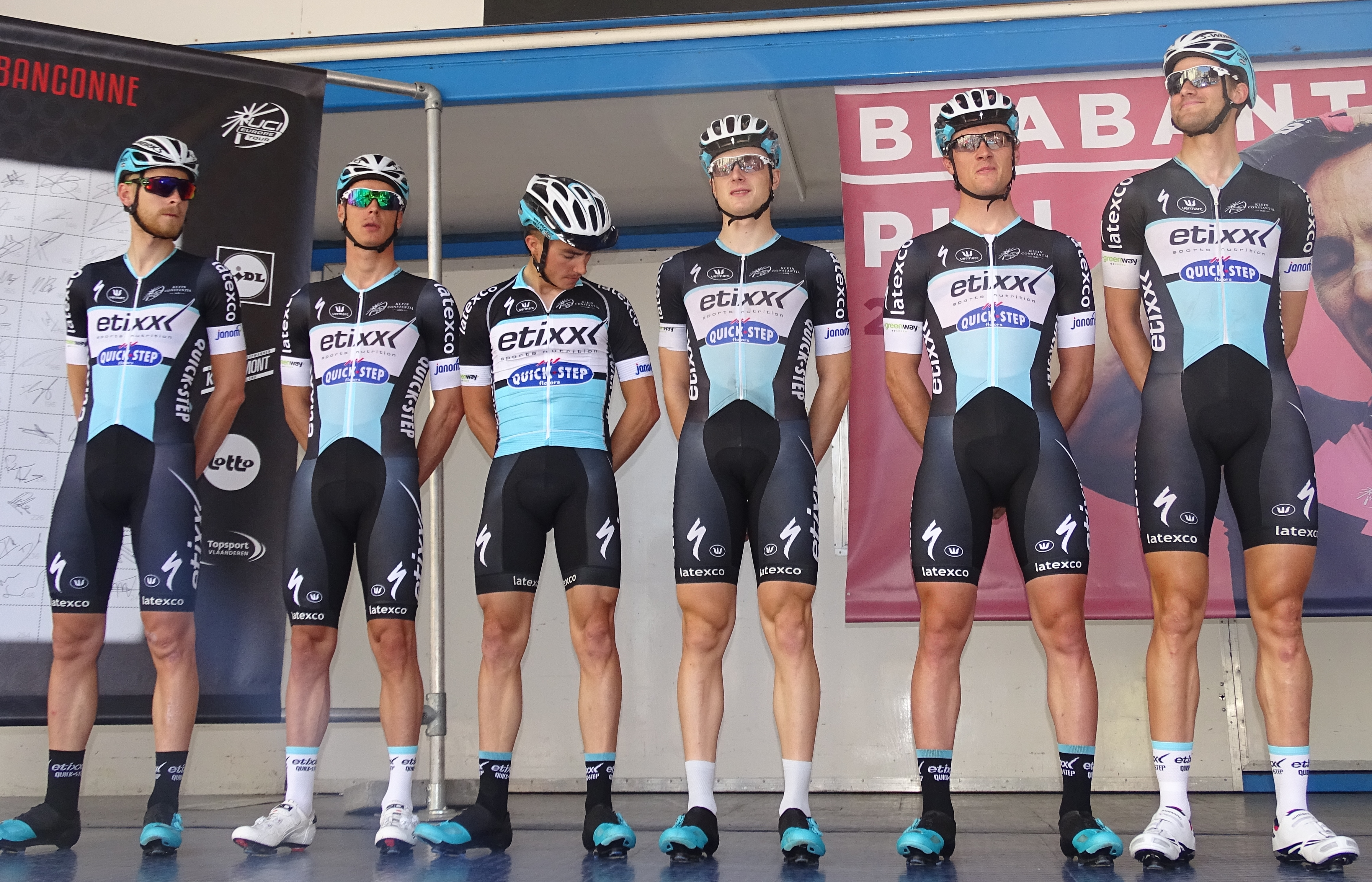 Reportage réalisé le mercredi 15 avril à l'occasion du départ de la Flèche brabançonne 2015 à Louvain, Belgique.